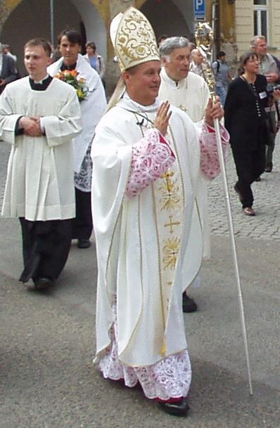 Mons. JUDr. Ing. Jan Vokál po své intronizaci